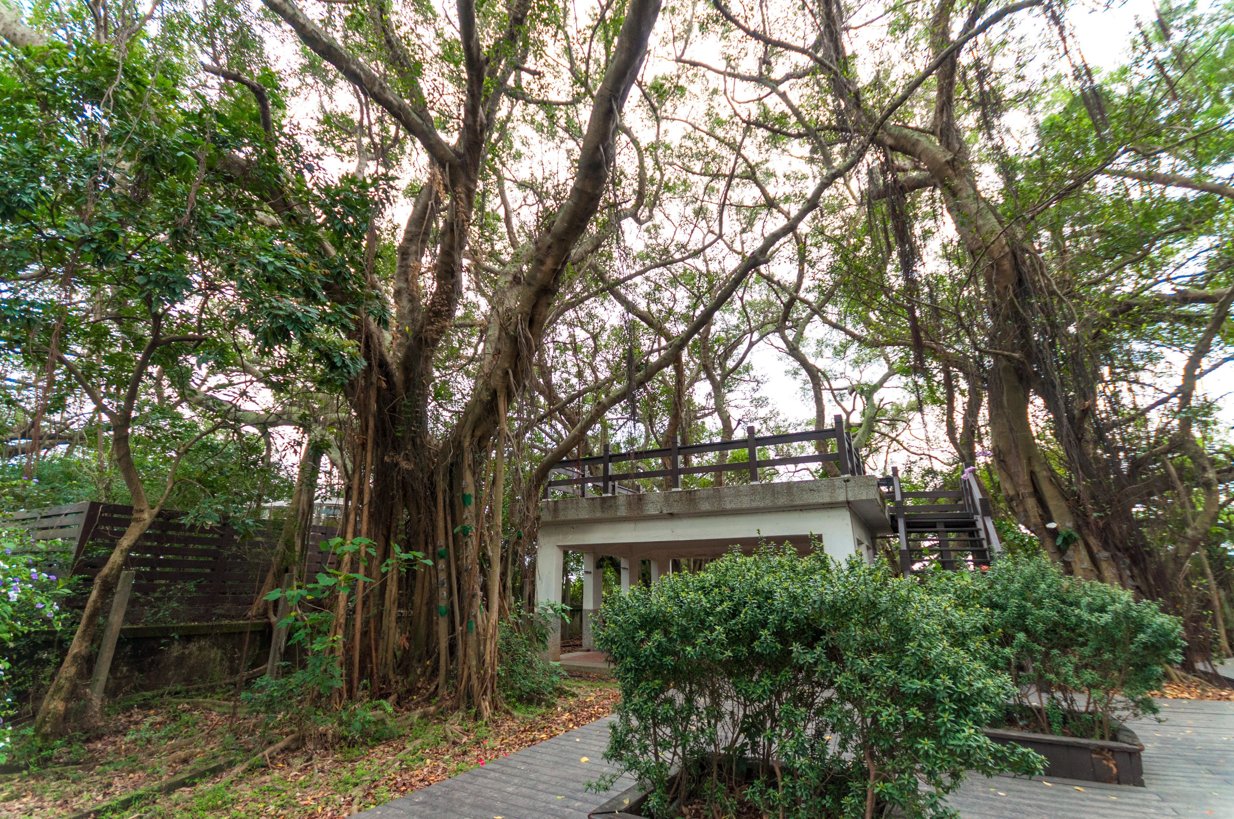 台東鯉魚山老樹休憩區